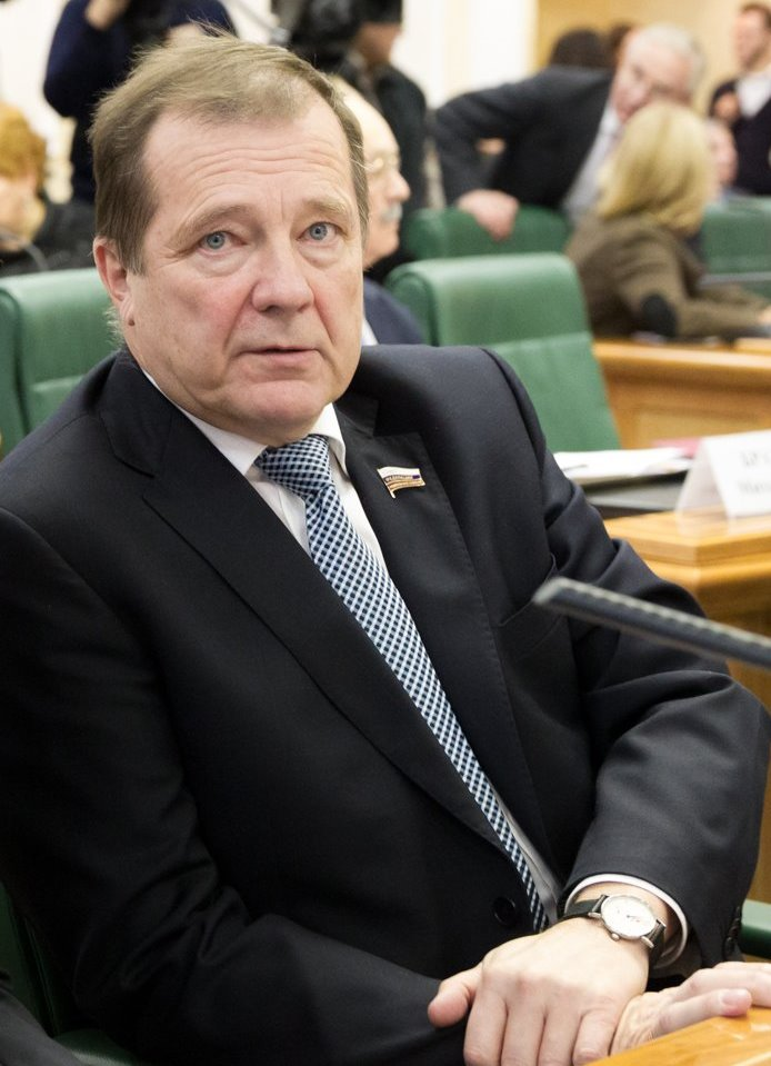 Сергей Леонидович Катанандов (род. 1955) — российский государственный деятель